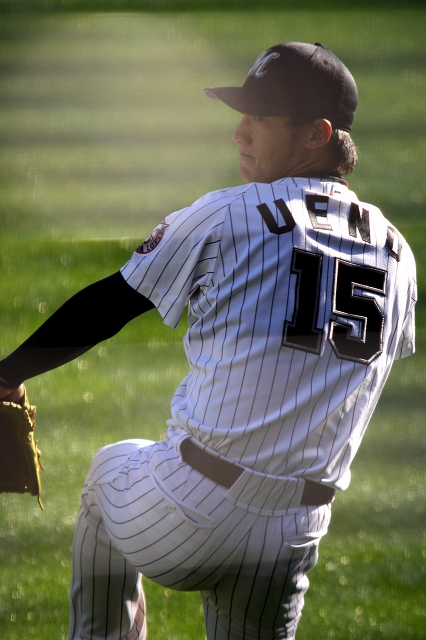 プロ野球 千葉ロッテマリーンズ 上野大樹 投手